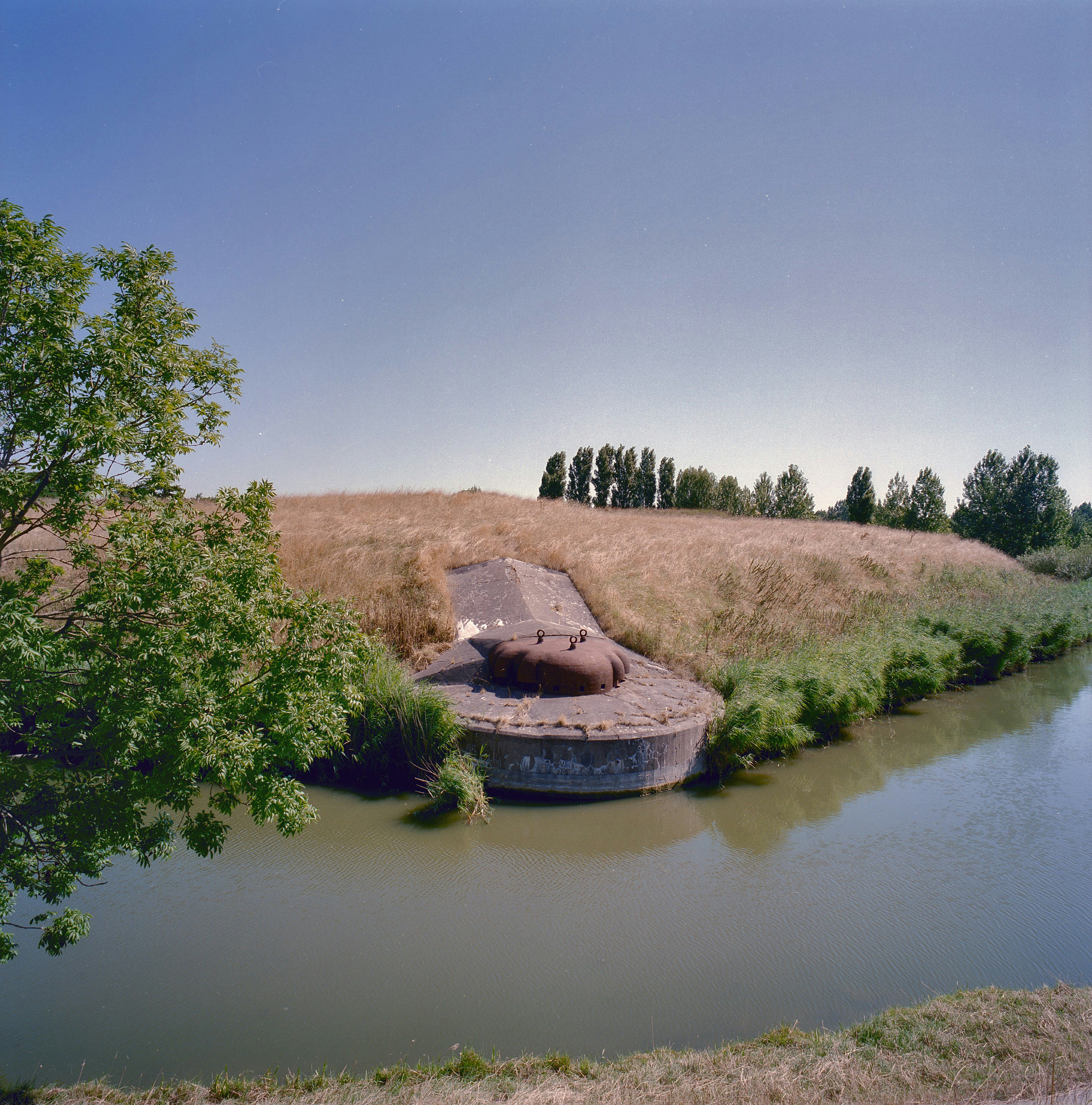 Fort bij Hoofddorp: Frontcaponnière